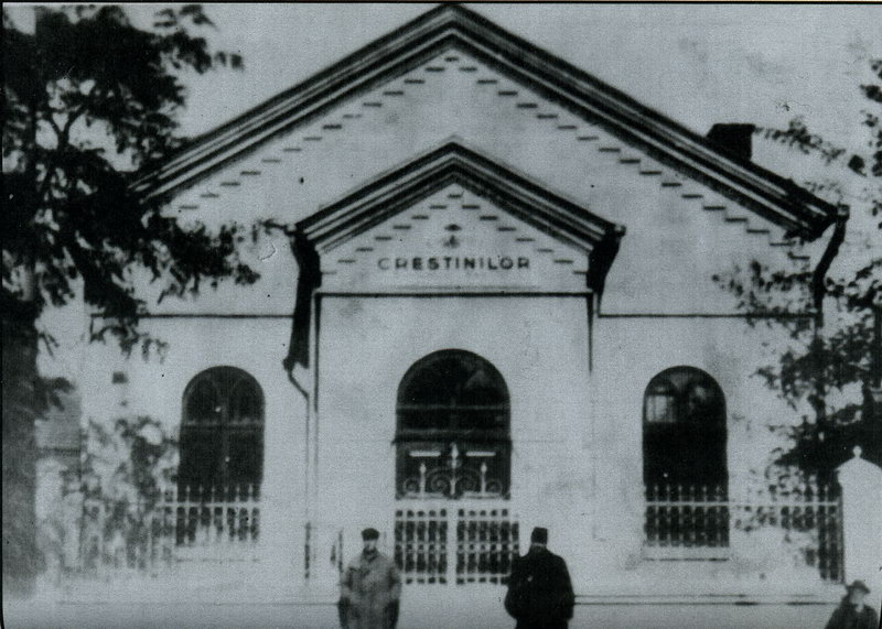 Молитвенный дом баптистской общины Кишинёва, построенный в 1922 году